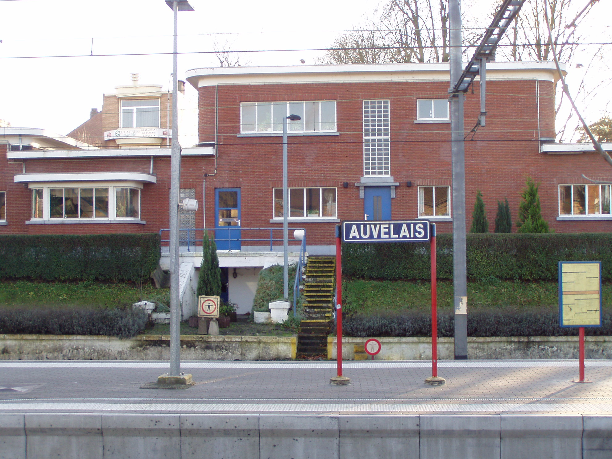 La gare SNCB d'Auvelais (vue depuis la rue Docteur Romedenne)